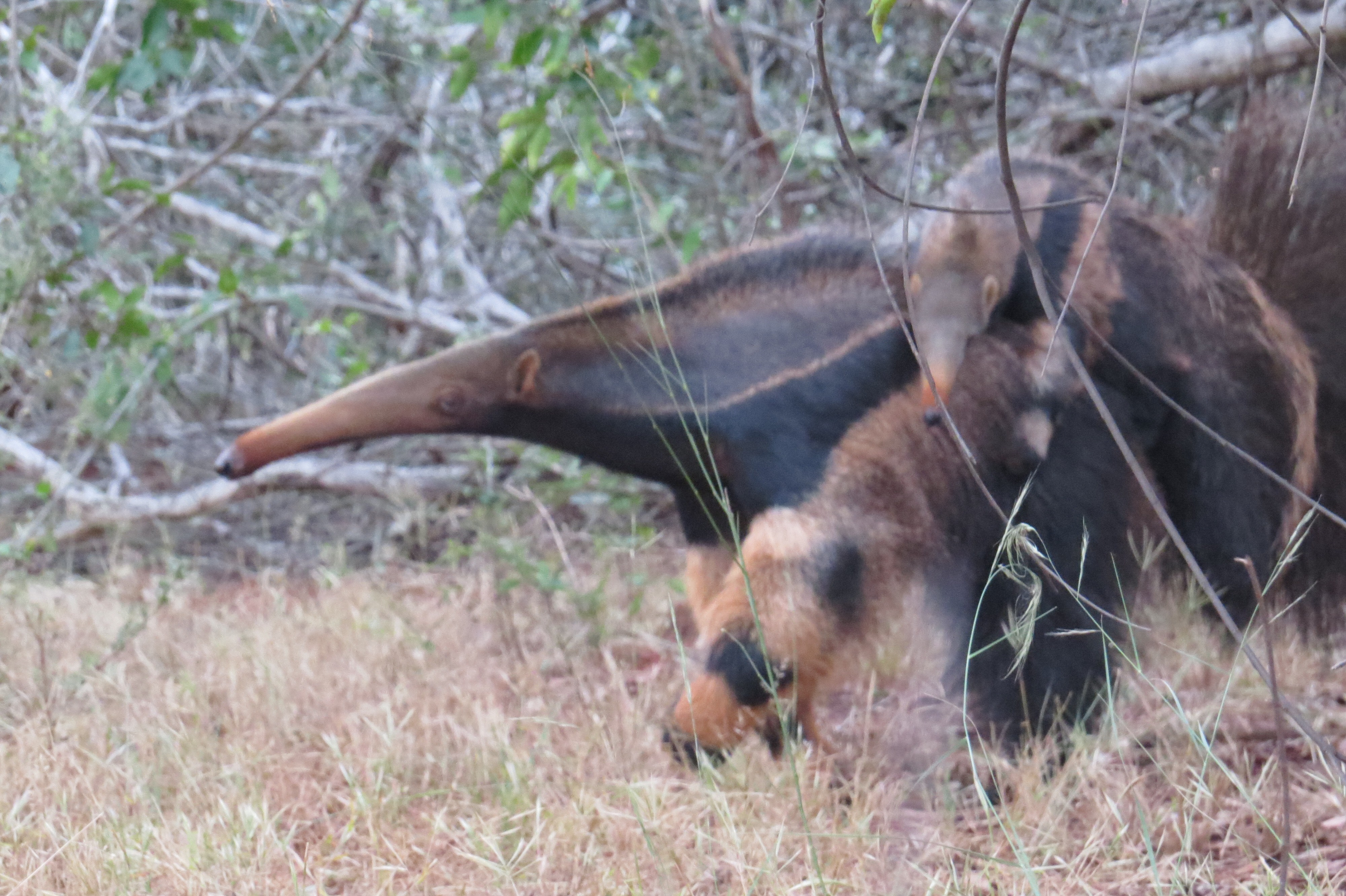 Myrmecophaga tridactyla - tamanduá-bandeira carregando seu filhote nas costas, em uma clareira em meio à vegetação de Cerrado na Reserva Florestal da CEMIG em São Simão - Goiás. Ao perceber a presença do fotógrafo retornou por uma trilha para o interior de uma mata secundária.